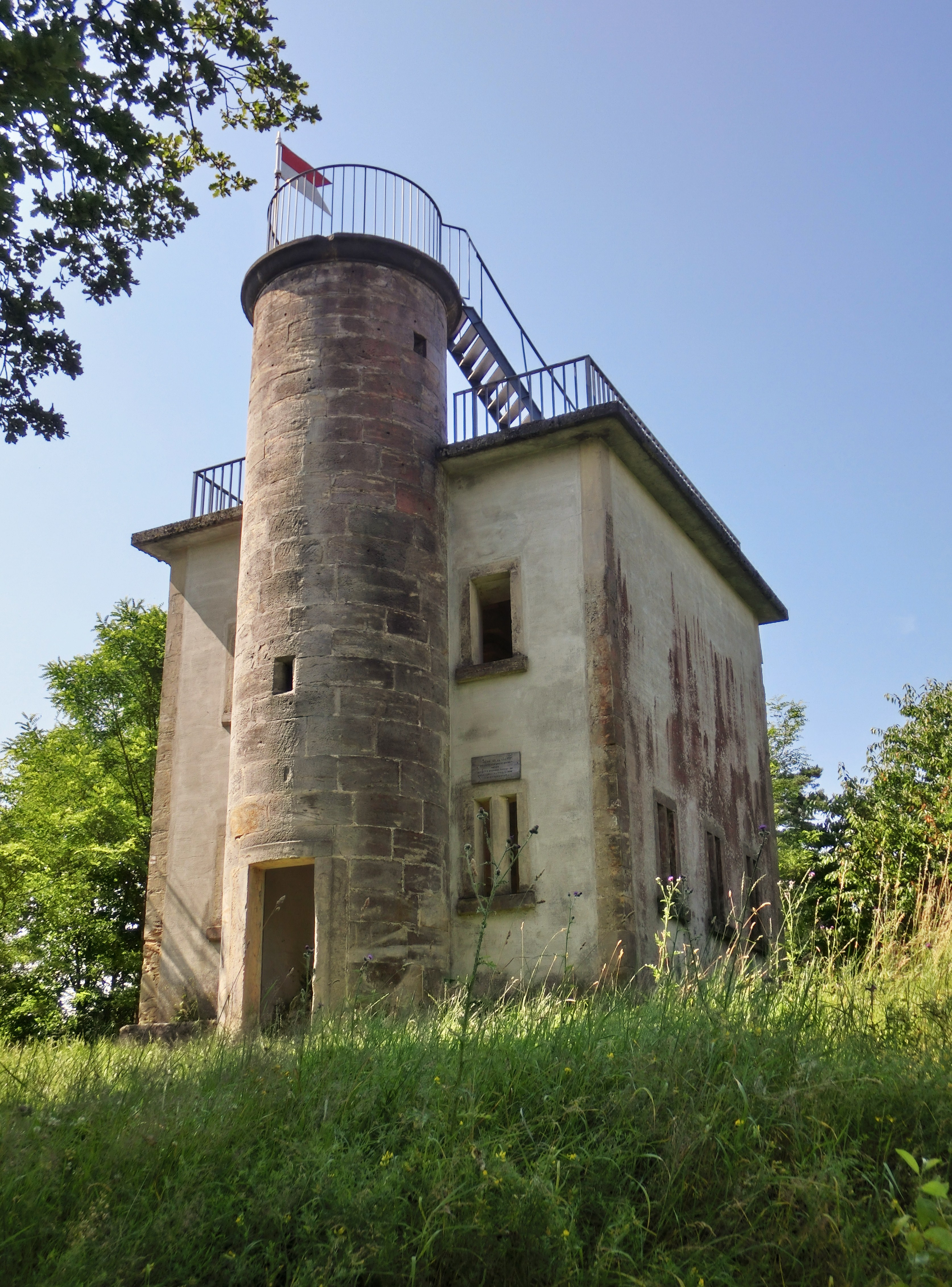 Aussichtsturm "Schaudichum" 3